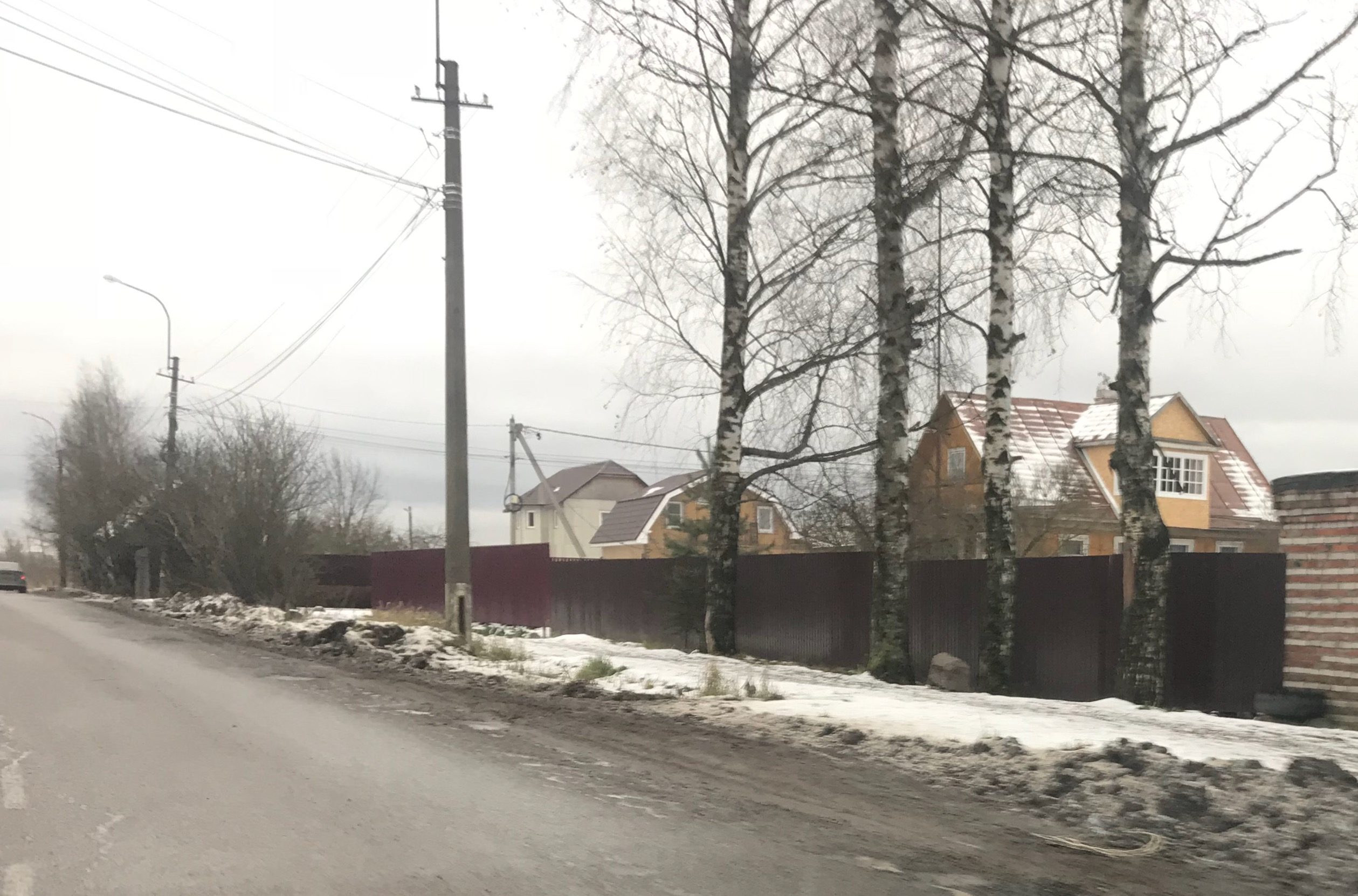 Никольское